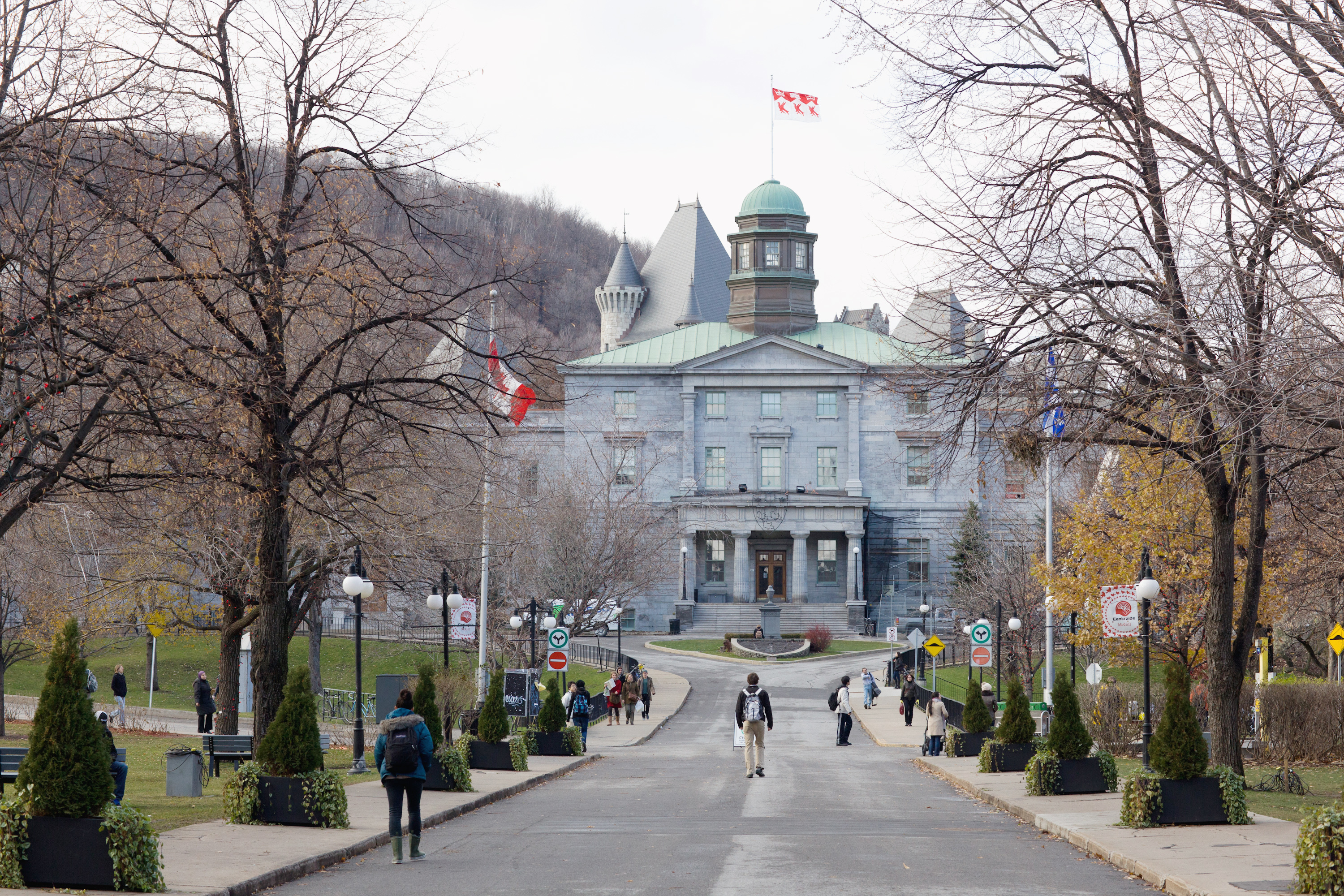 2011, Canada.